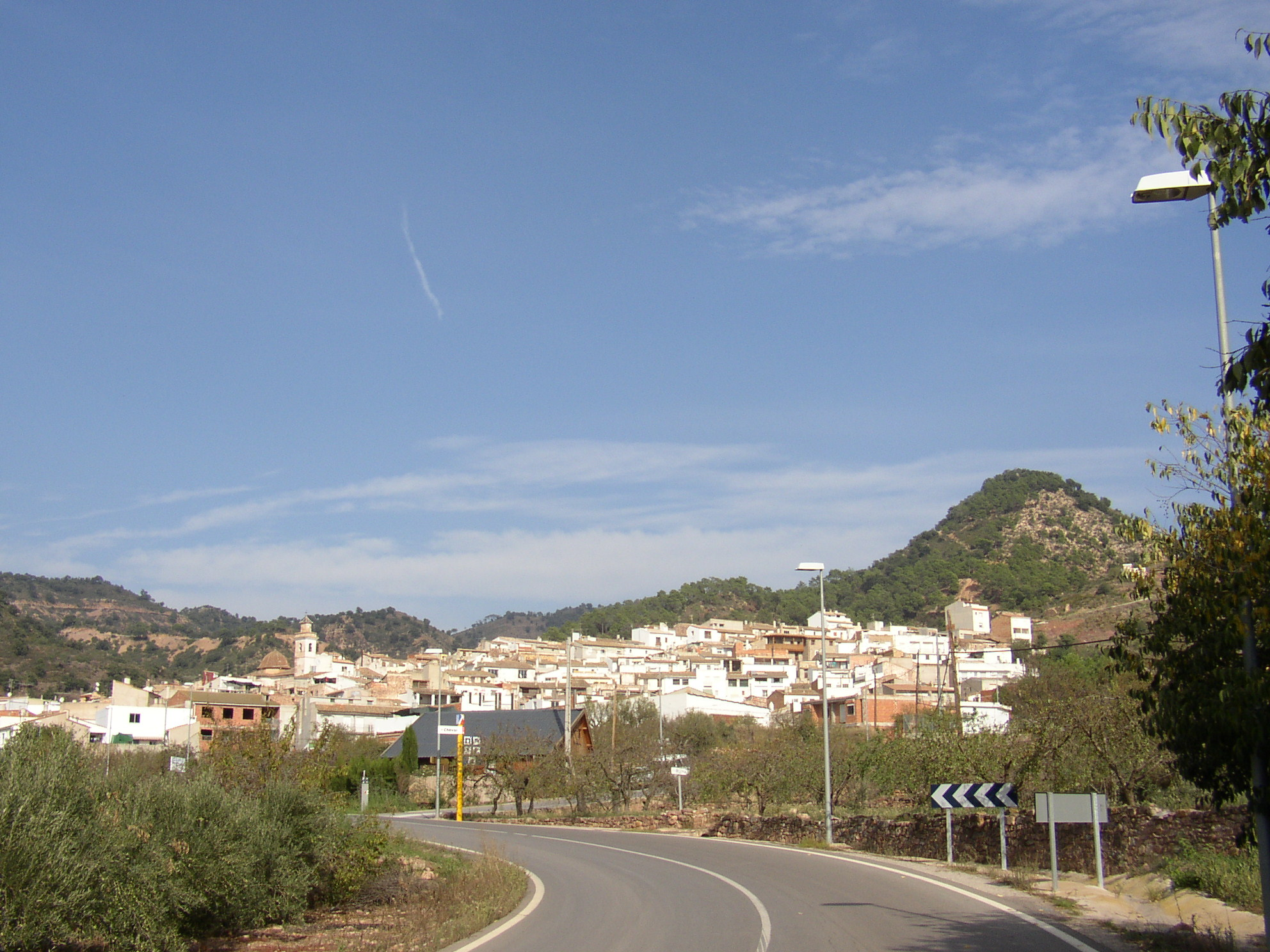 Castellón (Comunidad Valenciana) España. Chóvar. (provincia de Castellón). Vista general. Fotografía realizada el 1 noviembre de 2006 por el autor Usuario : Pelayo2